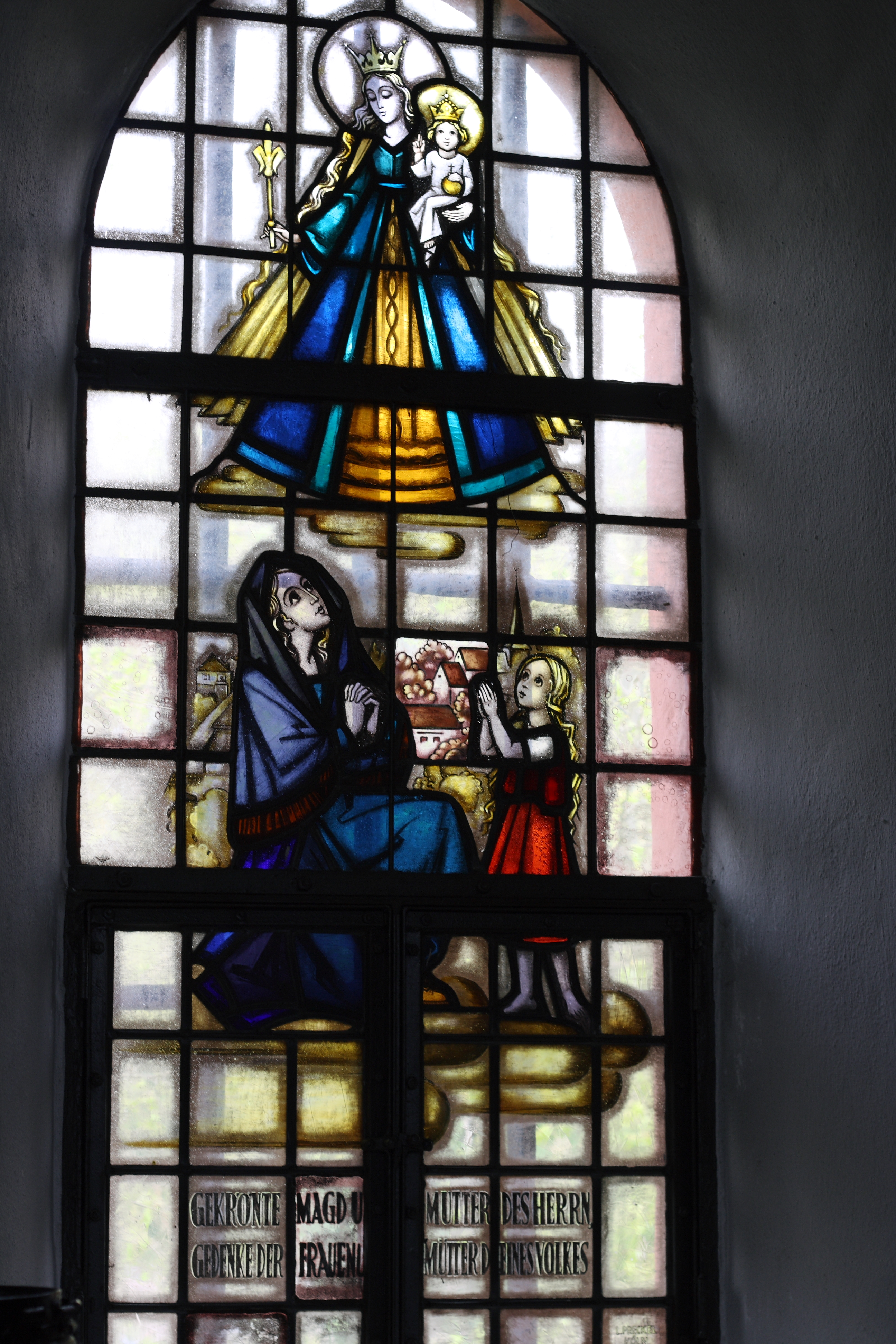 Bleiglasfenster in der katholischen Pfarrkirche Heilig-Kreuz in Kreuzweingarten, Darstellung: Anbetung von Madonna und Kind, Signatur: "L. PRECKEL KÖLN"